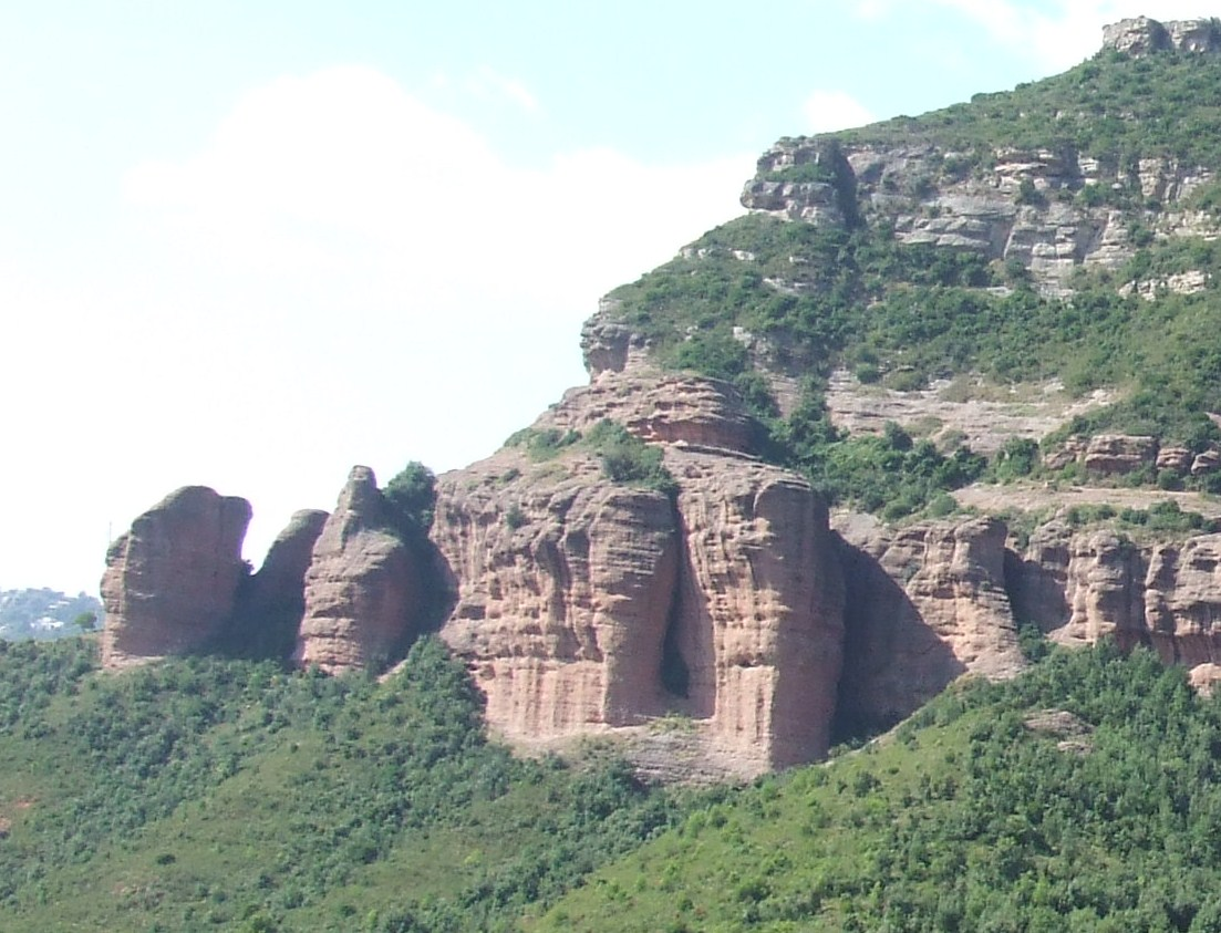 Roca del Migdia (Riells del Fai, Bigues i Riells, Vallès Oriental)